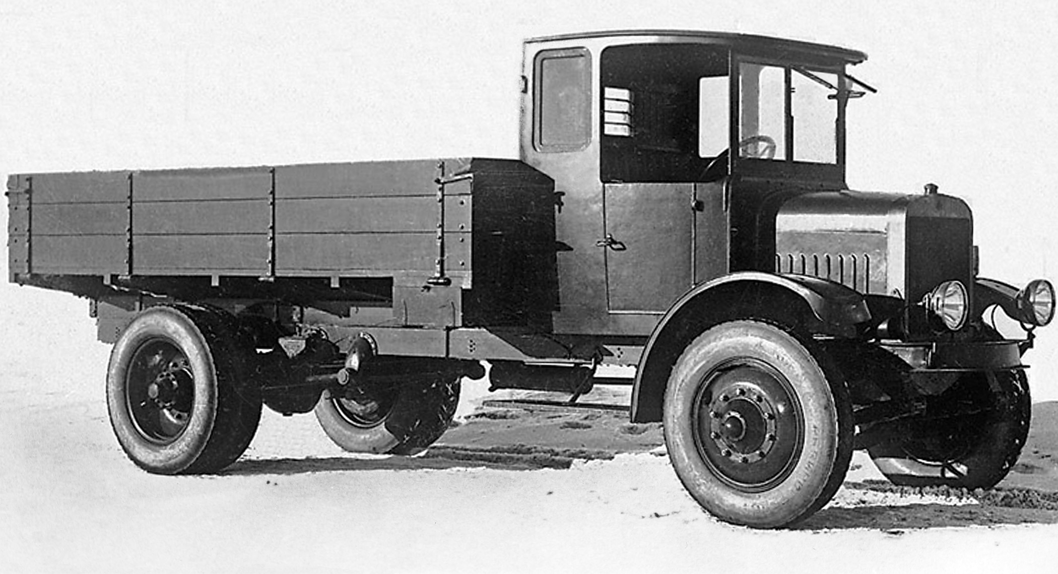 Я-3 - первый советский тяжёлый грузовик, выпускавшийся Ярославским государственным автомобильным заводом в 1925-1928 годах